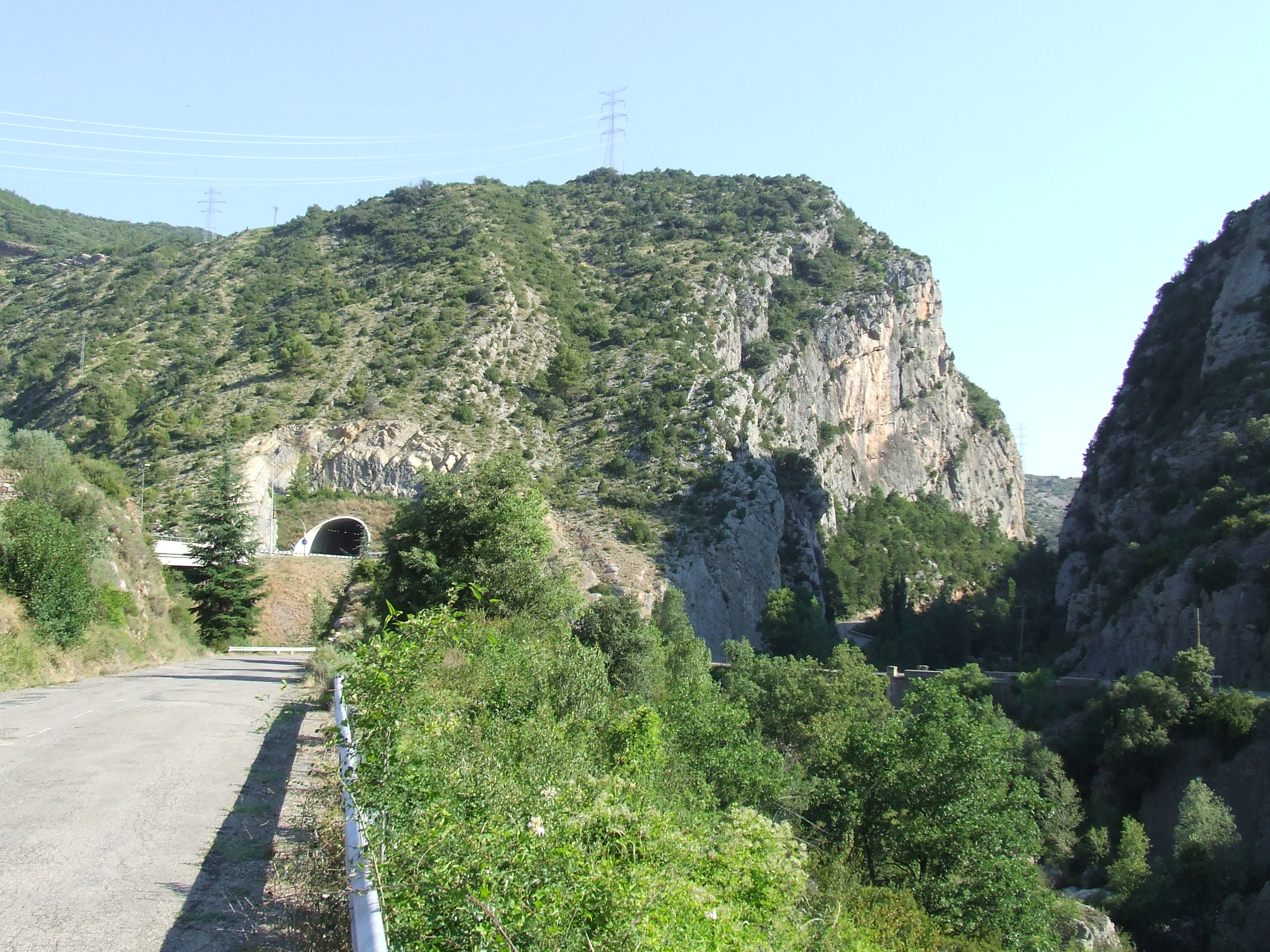 El túnel i el congost d'Erinyà (Conca de Dalt, Pallars Jussà)